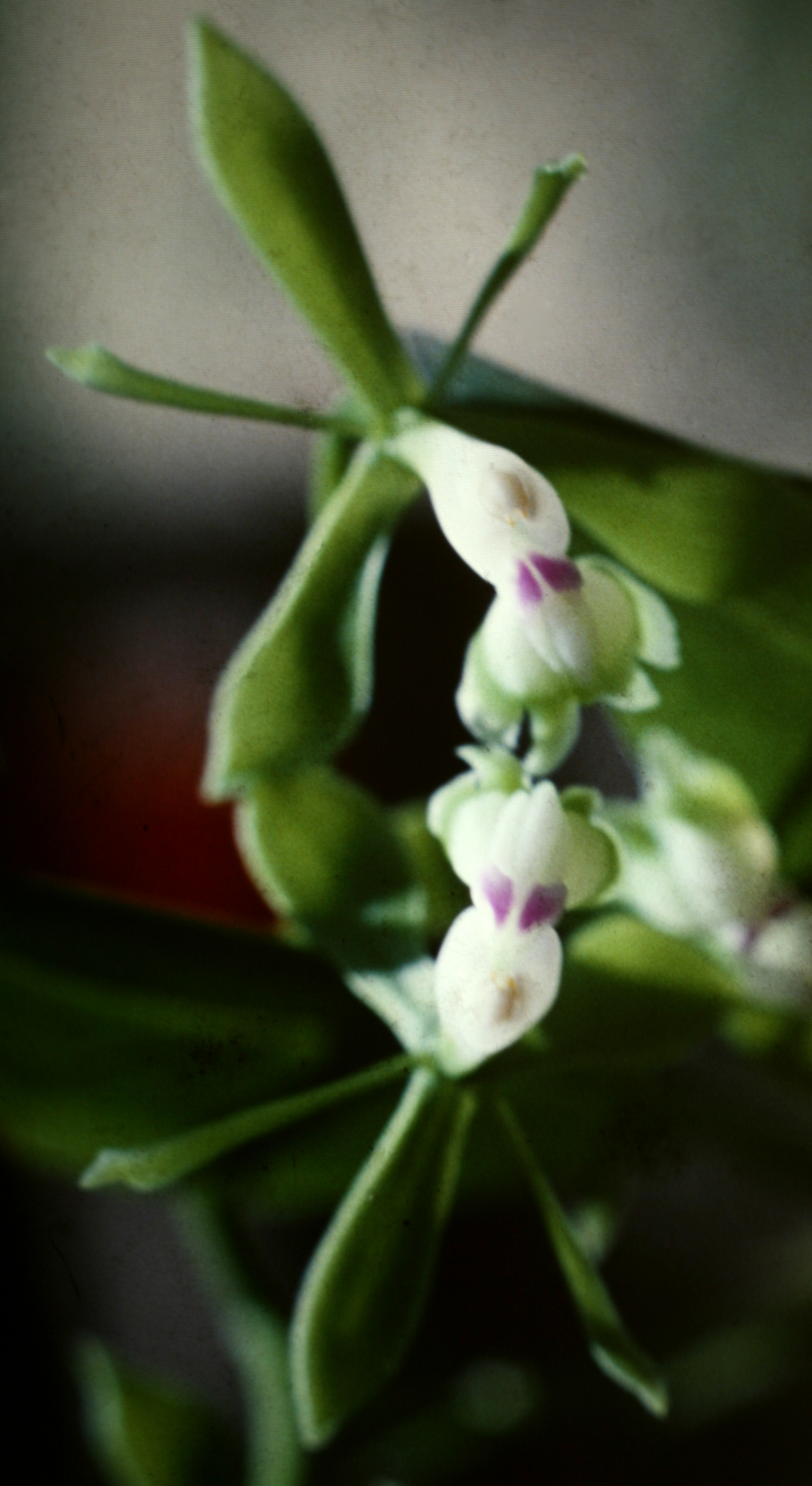 Epidendrum unguiculatum , Suriname.